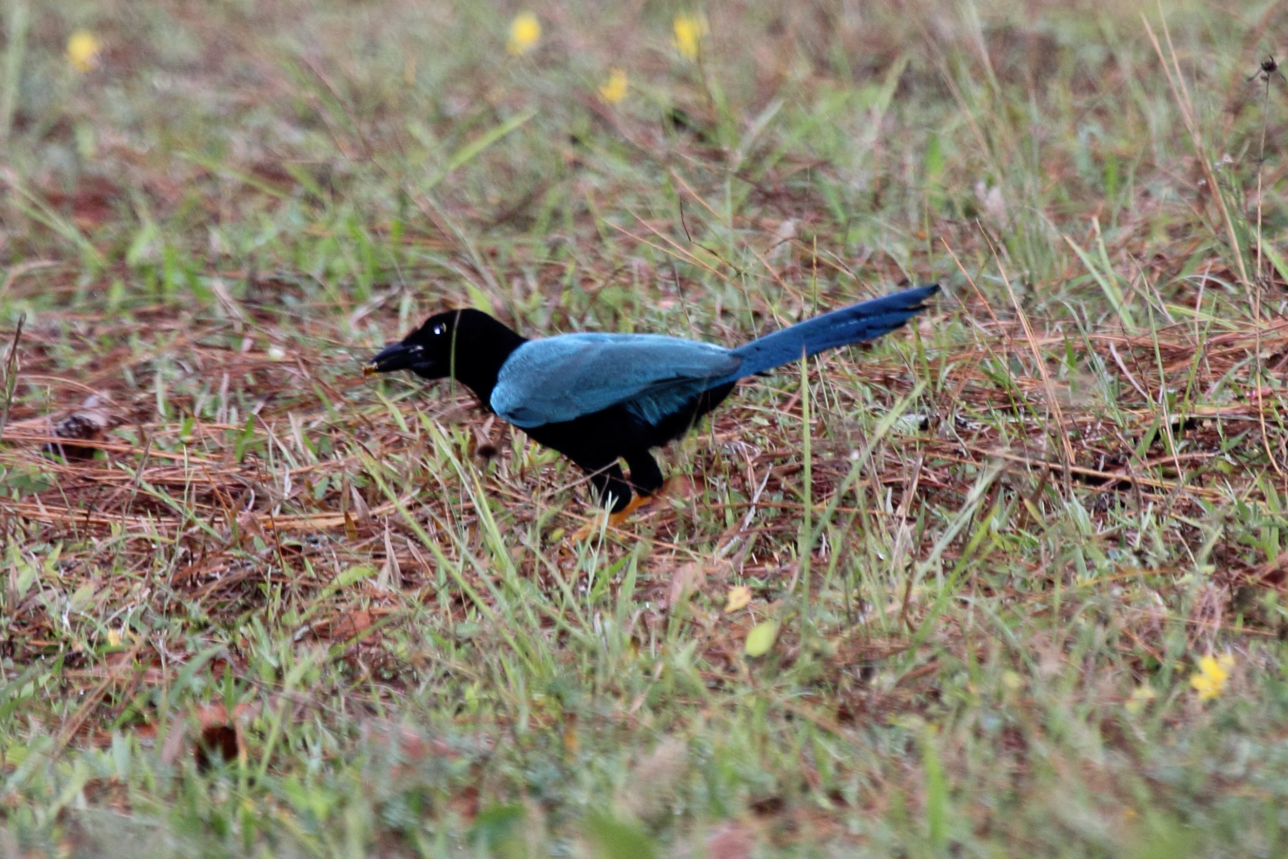 Yucatan Jay (Cyanocorax yucatanicus)